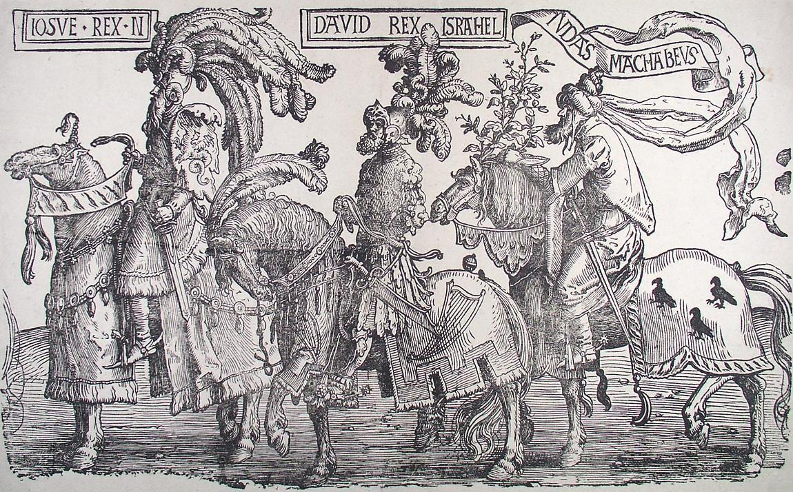 De helden Jozua, David en Judas de Makkabeeër (uit de serie De negen helden). woodcut. 38,5 × 54,2 cm. Rotterdam, Museum Boijmans Van Beuningen. Inventory number BdH 11000 (PK).